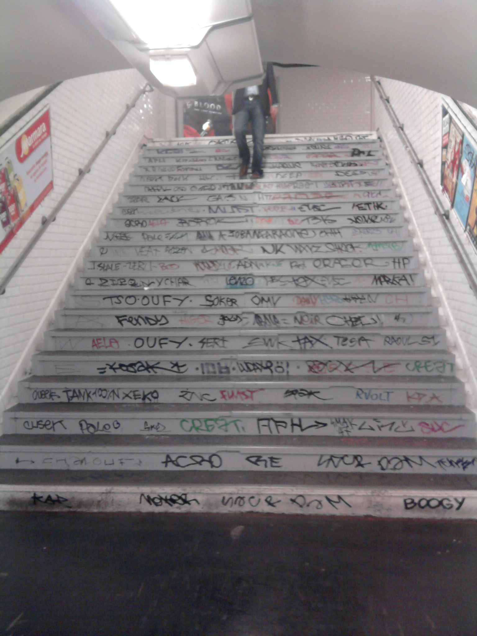 Les marches du métro Saint-Ambroise tagguées